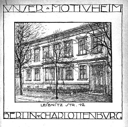 Zweites Motivhaus, erbaut aus Spenden